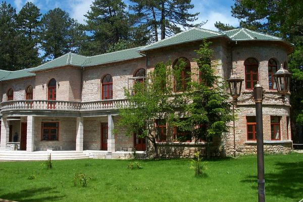 Voskopoja